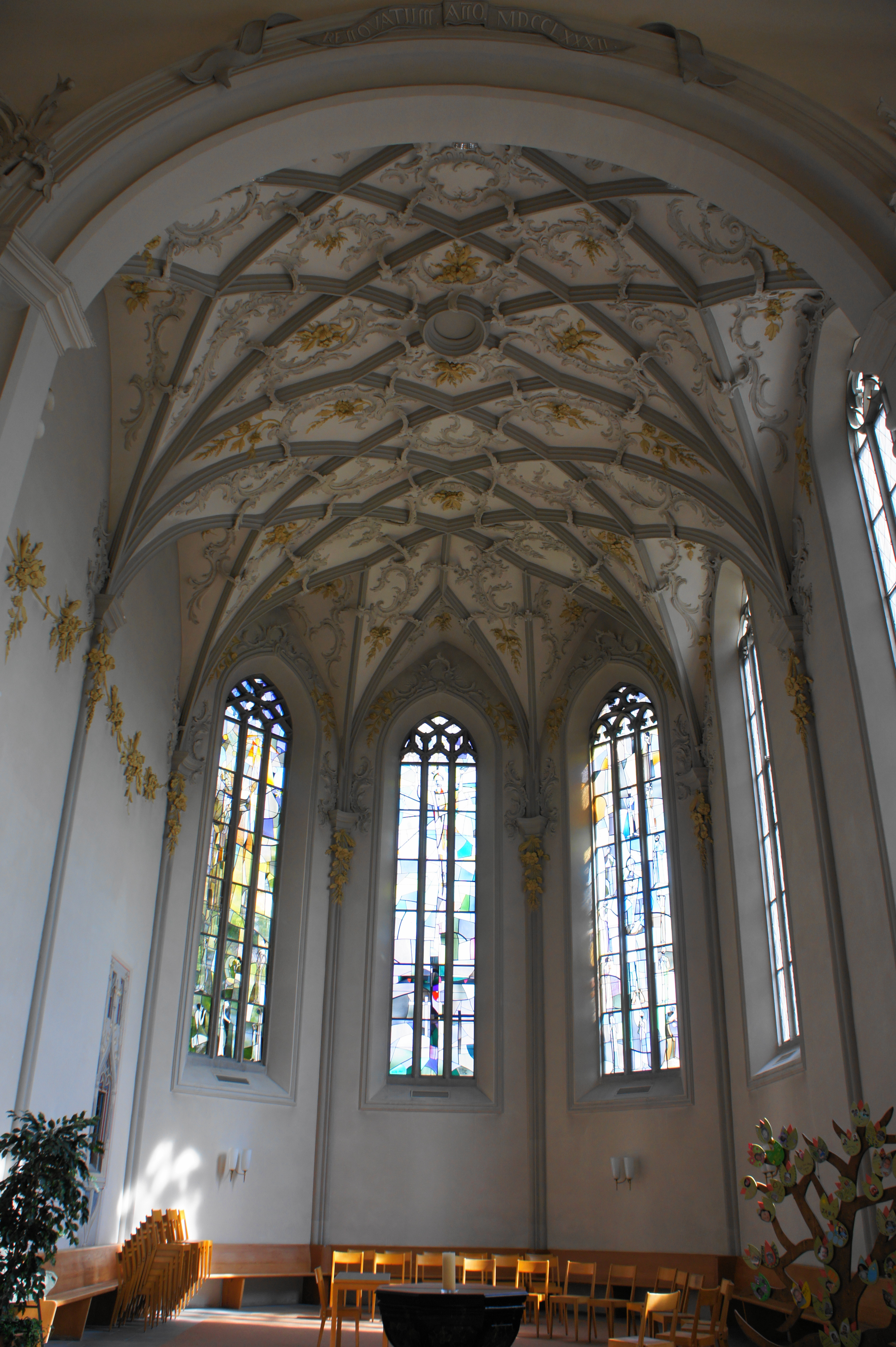 Blick gegen Osten in den Chor der ref. Kirche in Herisau. Augenfällig sind die Stuckaturen an der gotisch-gewölbten Decke. Aussergewöhnlich für eine ref. Kirche ist das Sakraments-Häuschen auf der linken Seite im Chor (Turmseite).